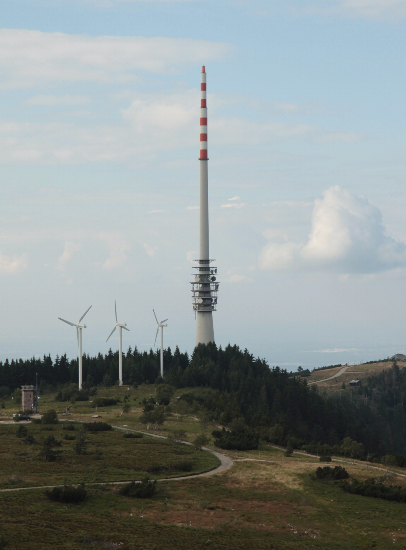 Der Sender Hornisgrinde und der Windpark (im Zustand vor dem Repowering 2015)